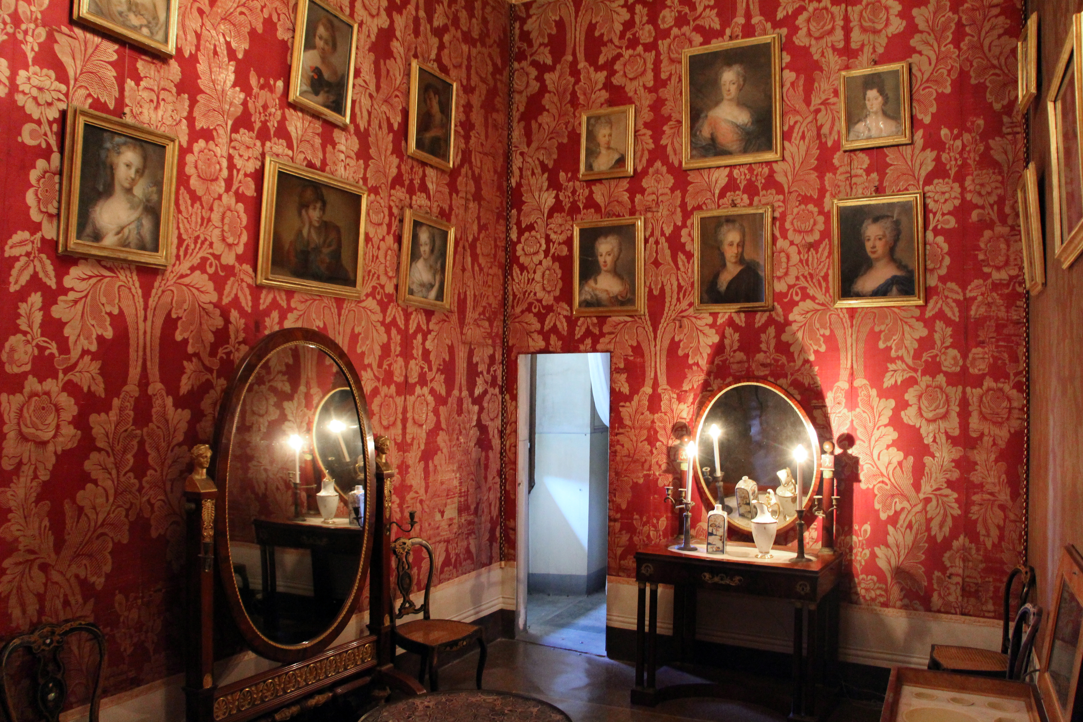 Villa medicea della Petraia - MIBAC The making of this document was supported by Wikimedia CH. (Submit your project!) For all the files concerned, please see the category Supported by Wikimedia CH. This is a photo of a monument which is part of cultural heritage of Italy.